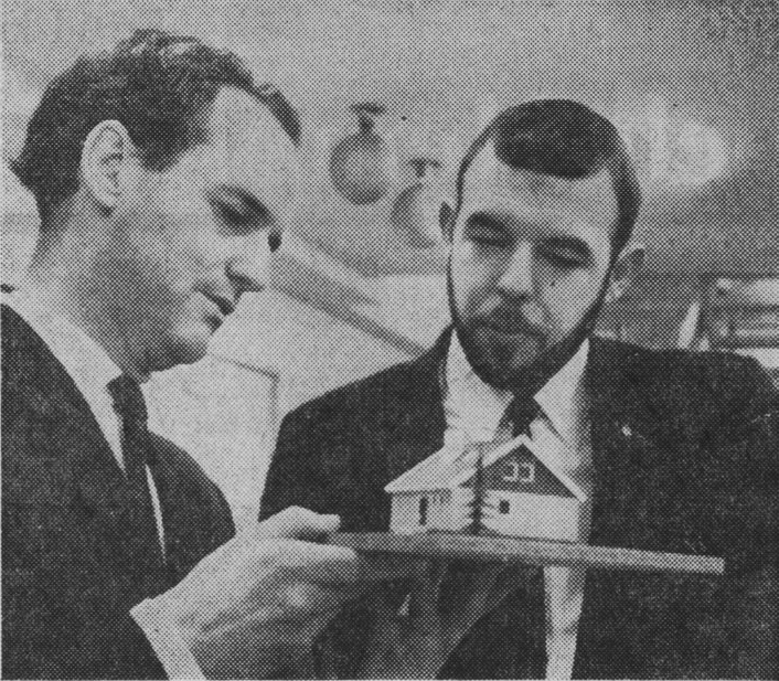 Kanslirådet Göte Svensson & arkitekten Carl-Johan von Grothusen talar småhus i Byggtjänst lokaler i Stockholm